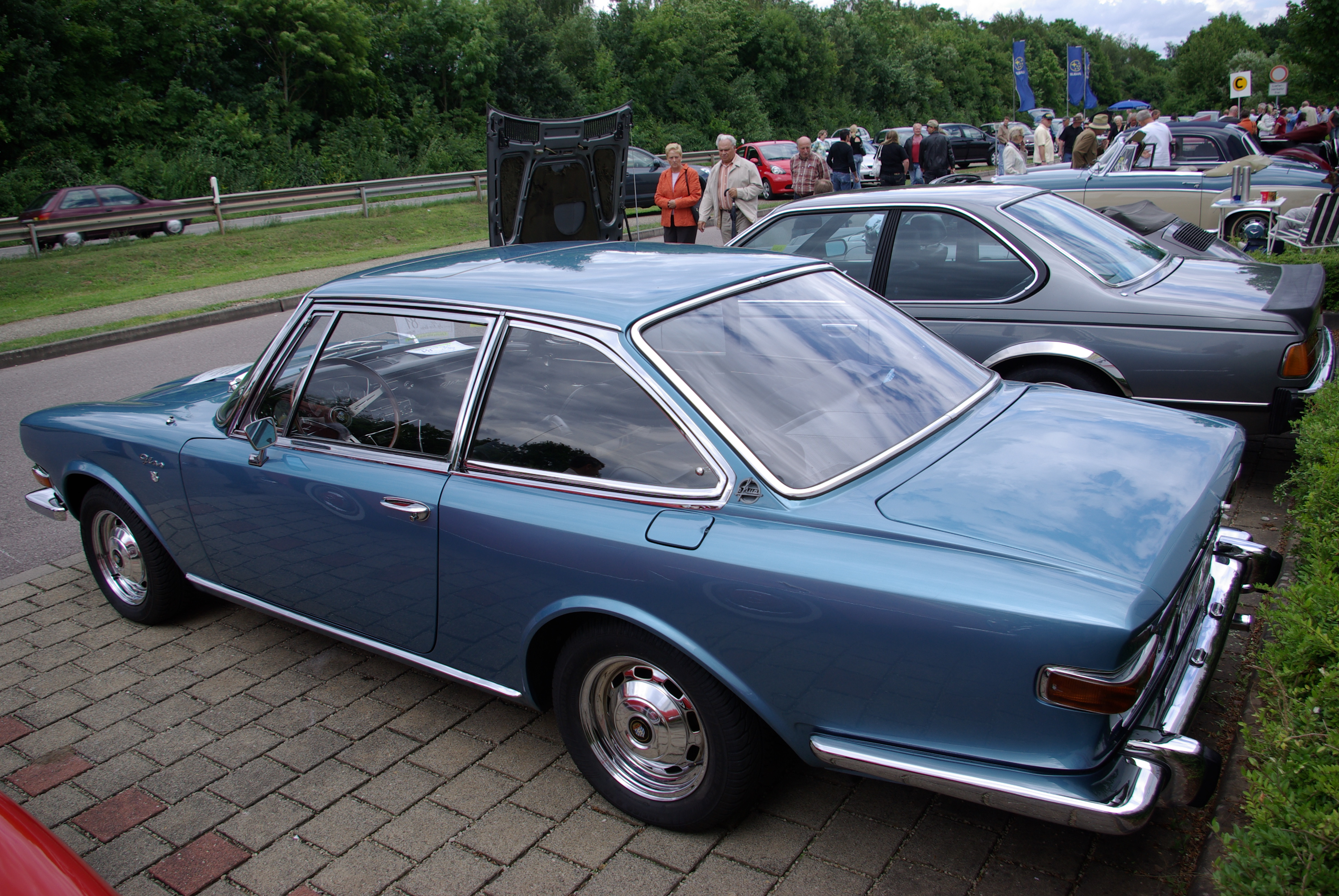 Glas V8 Baujahr 1967 Leistung 150 PS Hubraum 2580 cm³ Höchstgeschwindigkeit 192 km/h Neupreis 19400 DM